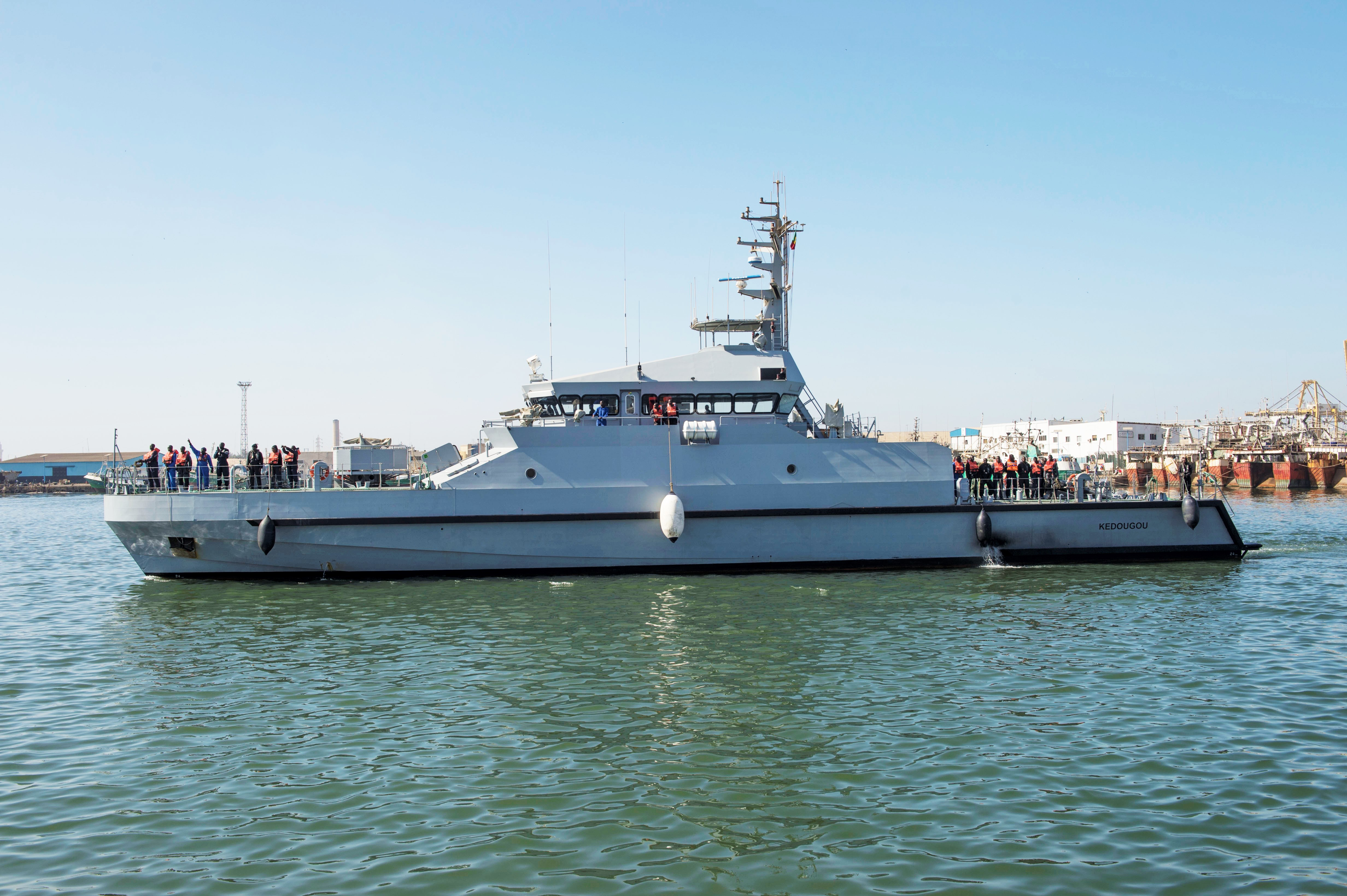 Le Kédougou, OPV 45 de la marine sénégalaise.